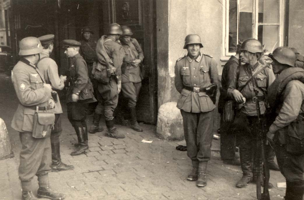 Зутріч німецьких і радянських солдат в вересні 1939 року у захопленому Львові.